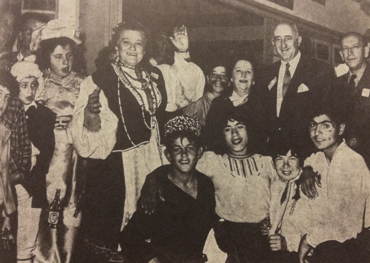 נשף פורים יחד עם ילדי קרית יערים